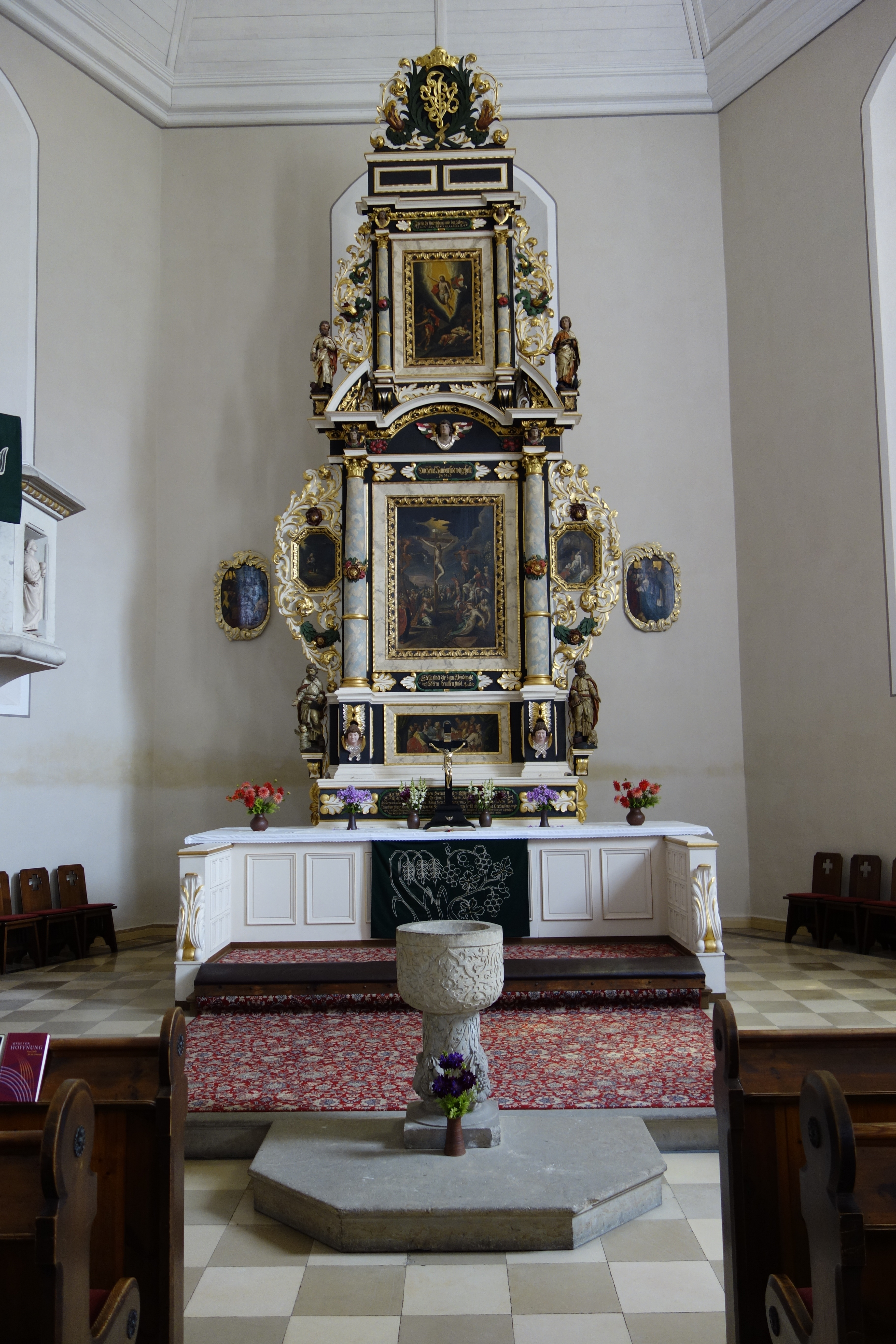 Kirche Königsbrück Juli 2017 (12)